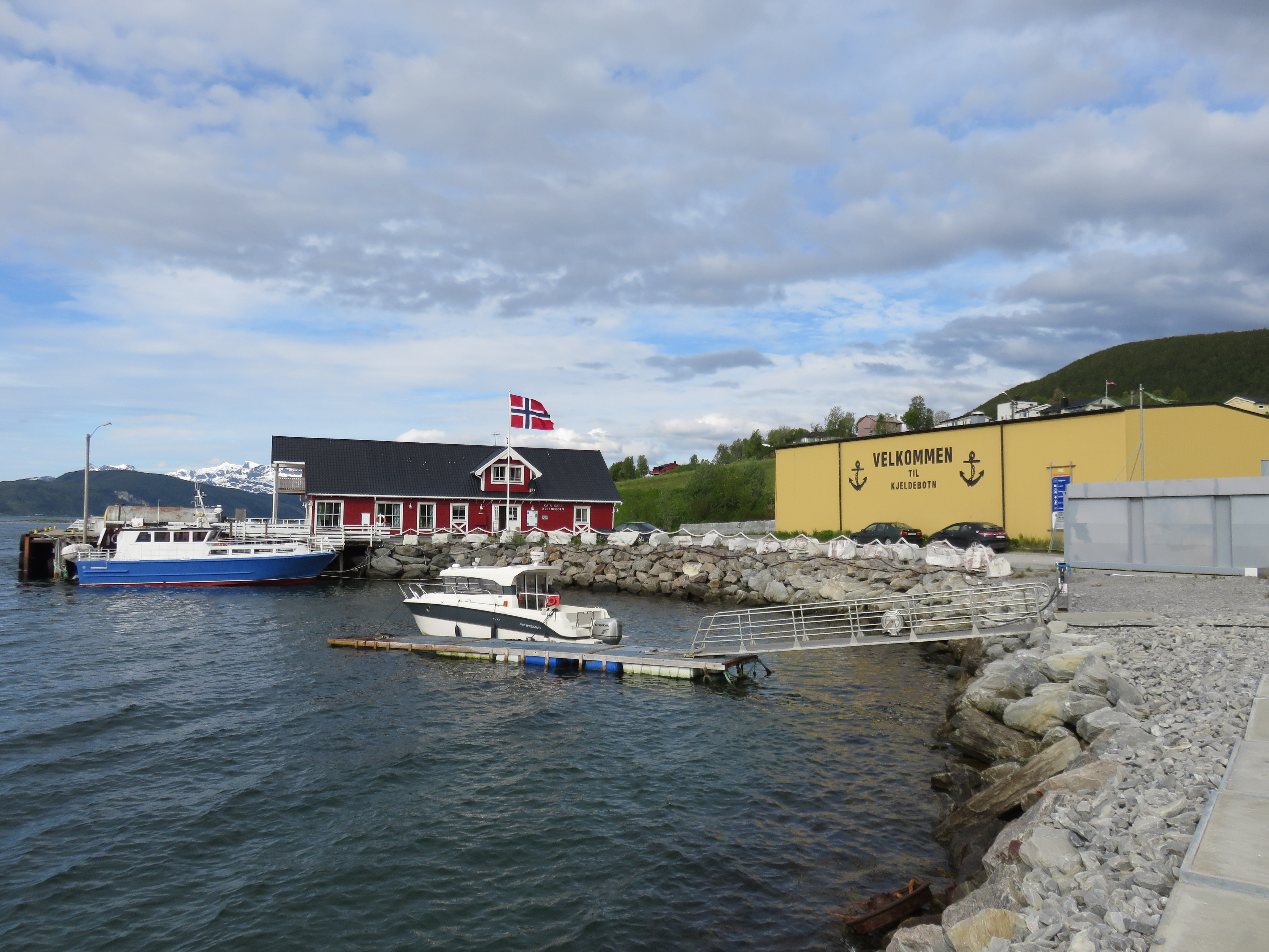 Kjeldebotn i Ballangen kommune. Hurtigbåtkaia.